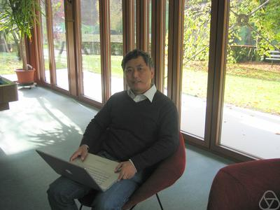 Foto di Mitsuhiro Shishikura